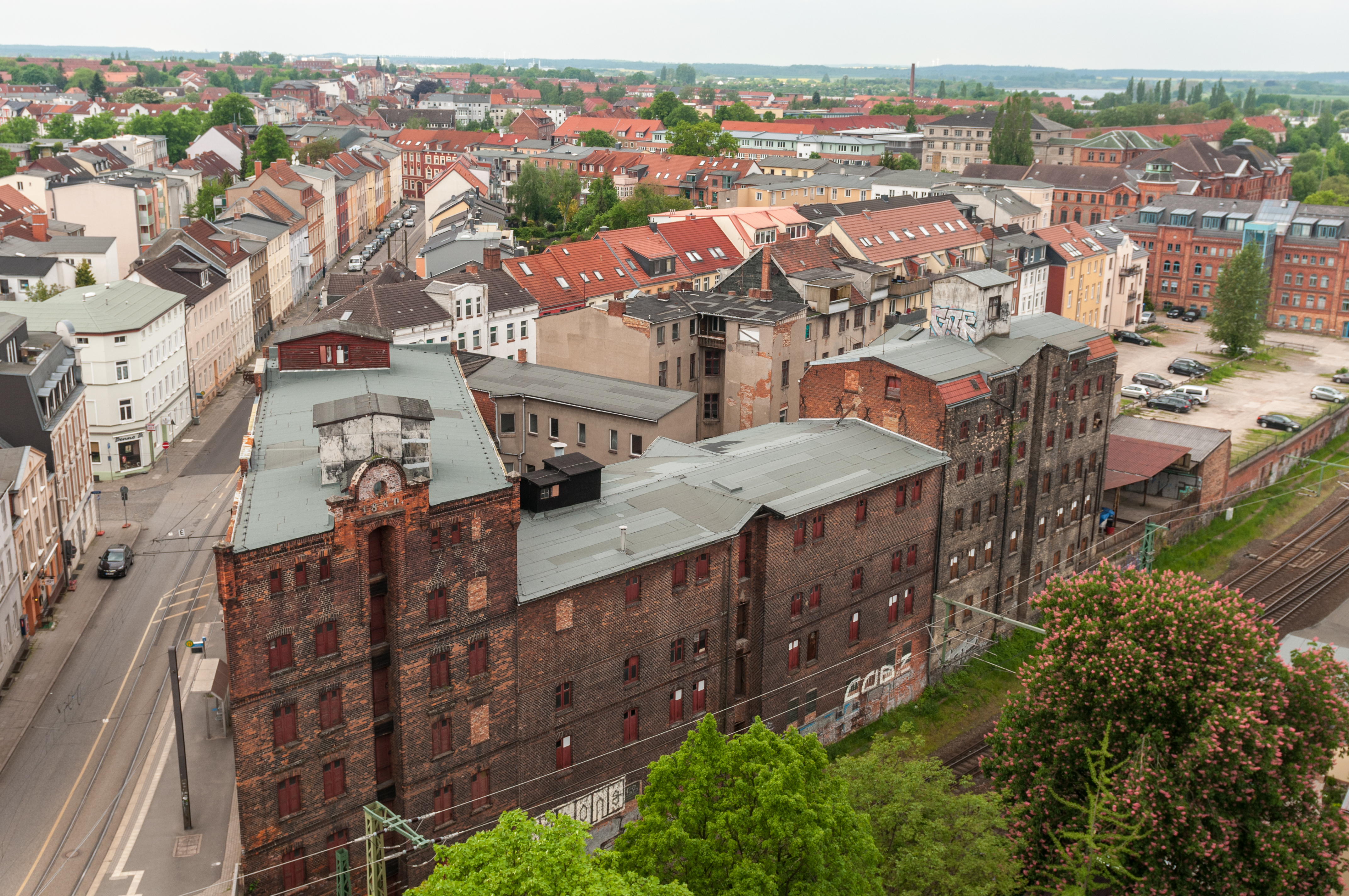 Blick von der Paulskirche Schwerin